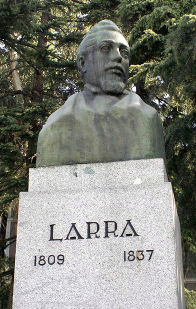 Monumento a Mariano José de Larra en Madrid. Calle Bailén, frente a la Catedral de La Almudena.